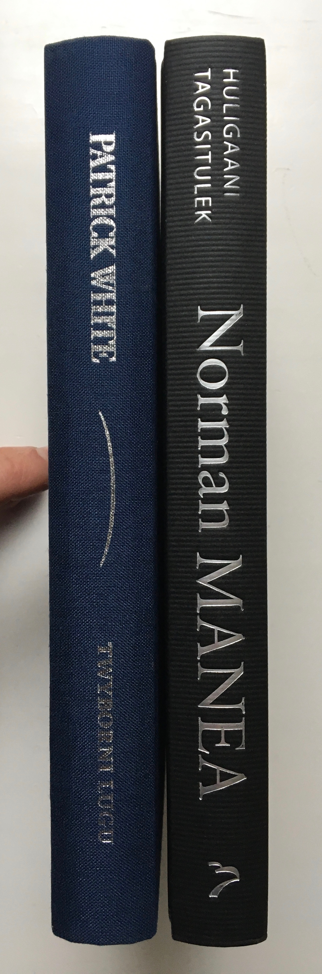 20. saj. paberita seljad